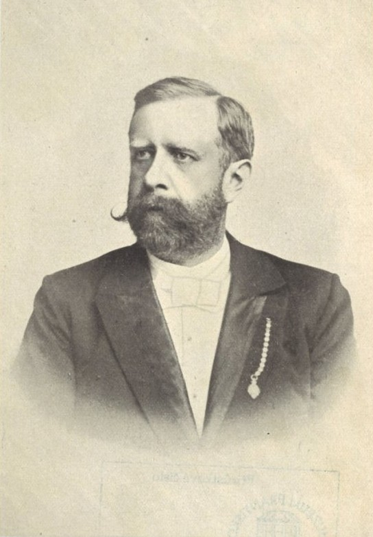 Gustav Gschier (1852-1916)